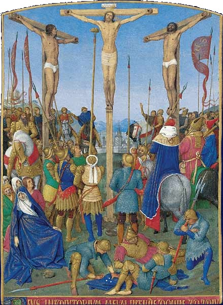 Le Christ est en croix, à qui l'ont tend l'éponge et entouré des deux larrons. A ses pieds, des soldats, Pilate et le grand prêtre à cheval sont tournés vers lui. Un groupe de soldats jouent aux dés le manteau du Christ en bas à droite. En bas à gauche, la Vierge est effondrée dans les bras de saint Jean.